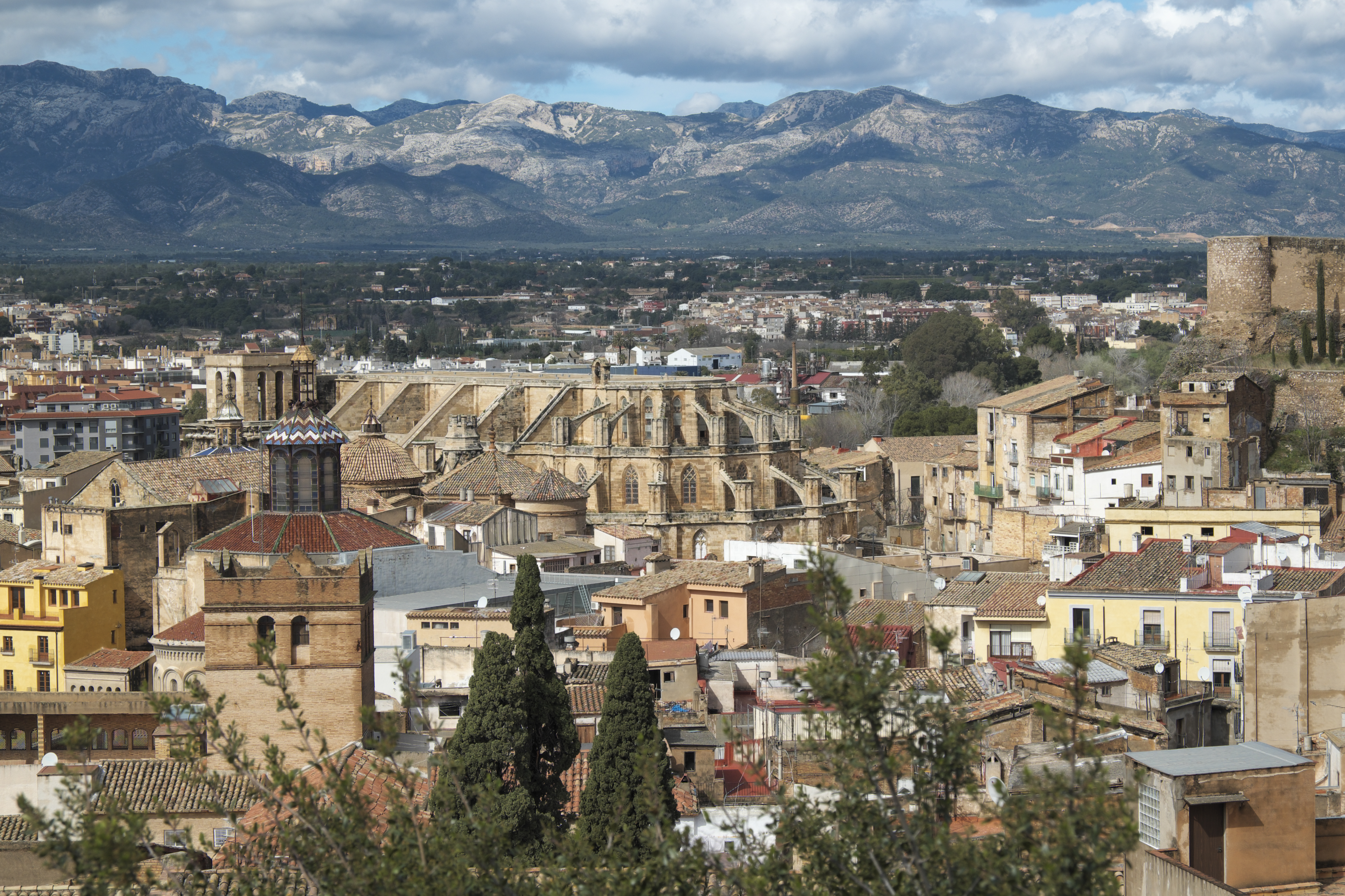 Tortosa in der Provinz Tarragona (Katalonien/Spanien), Blick auf die Burg (Castillo de la Zuda) und die Kathedrale